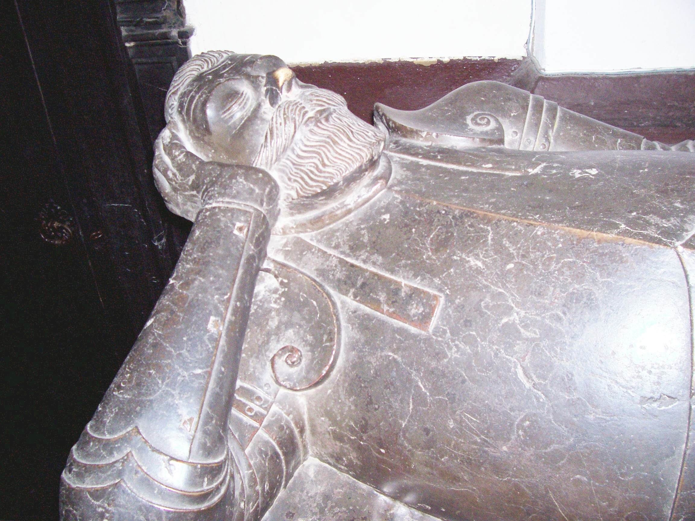 Postać hetmana z nagrobka w Koniecpolu (drugi podobny znajduje się w ukraińskich Brodach)